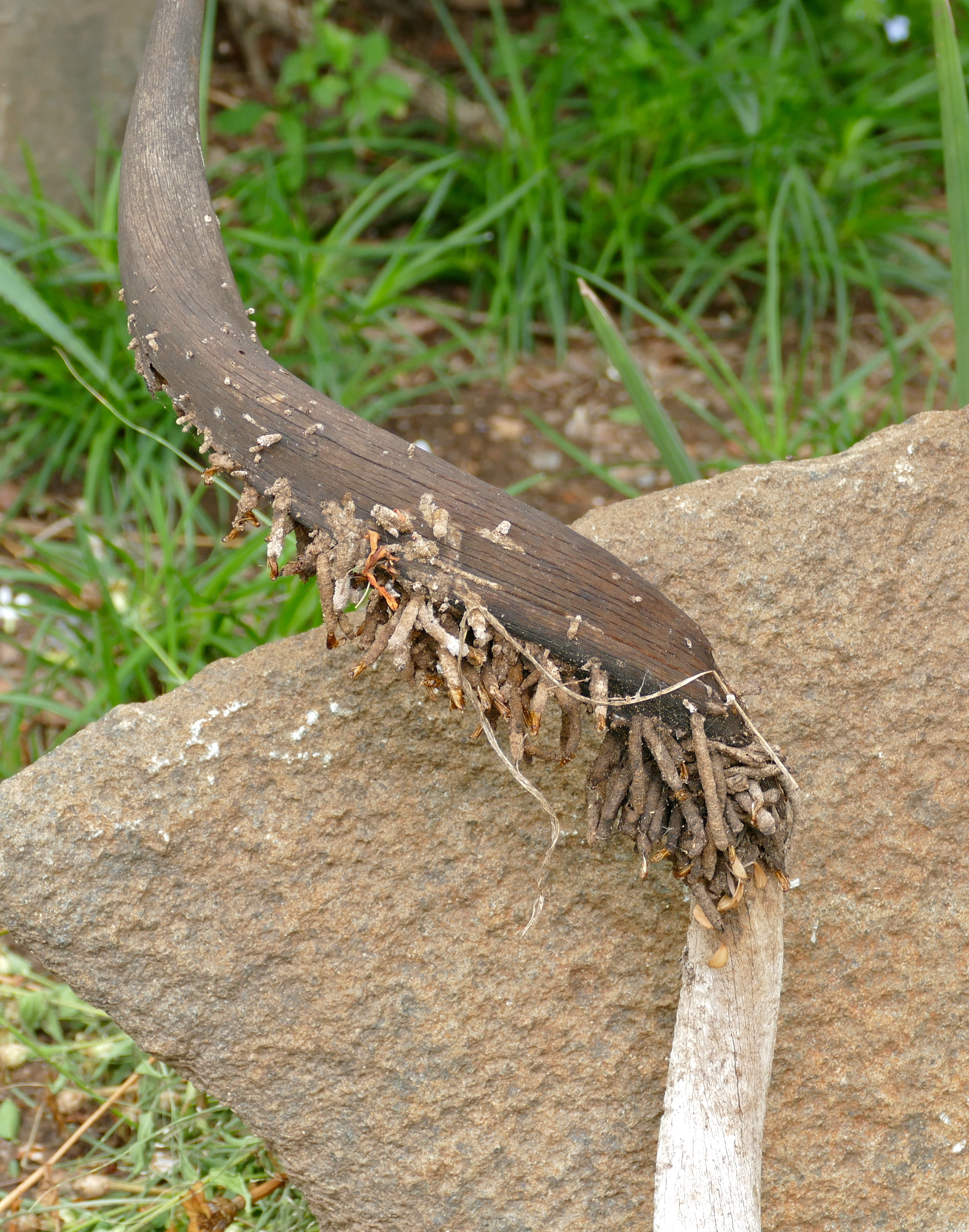 Orpen Camp, Kruger NP, SOUTH AFRICA